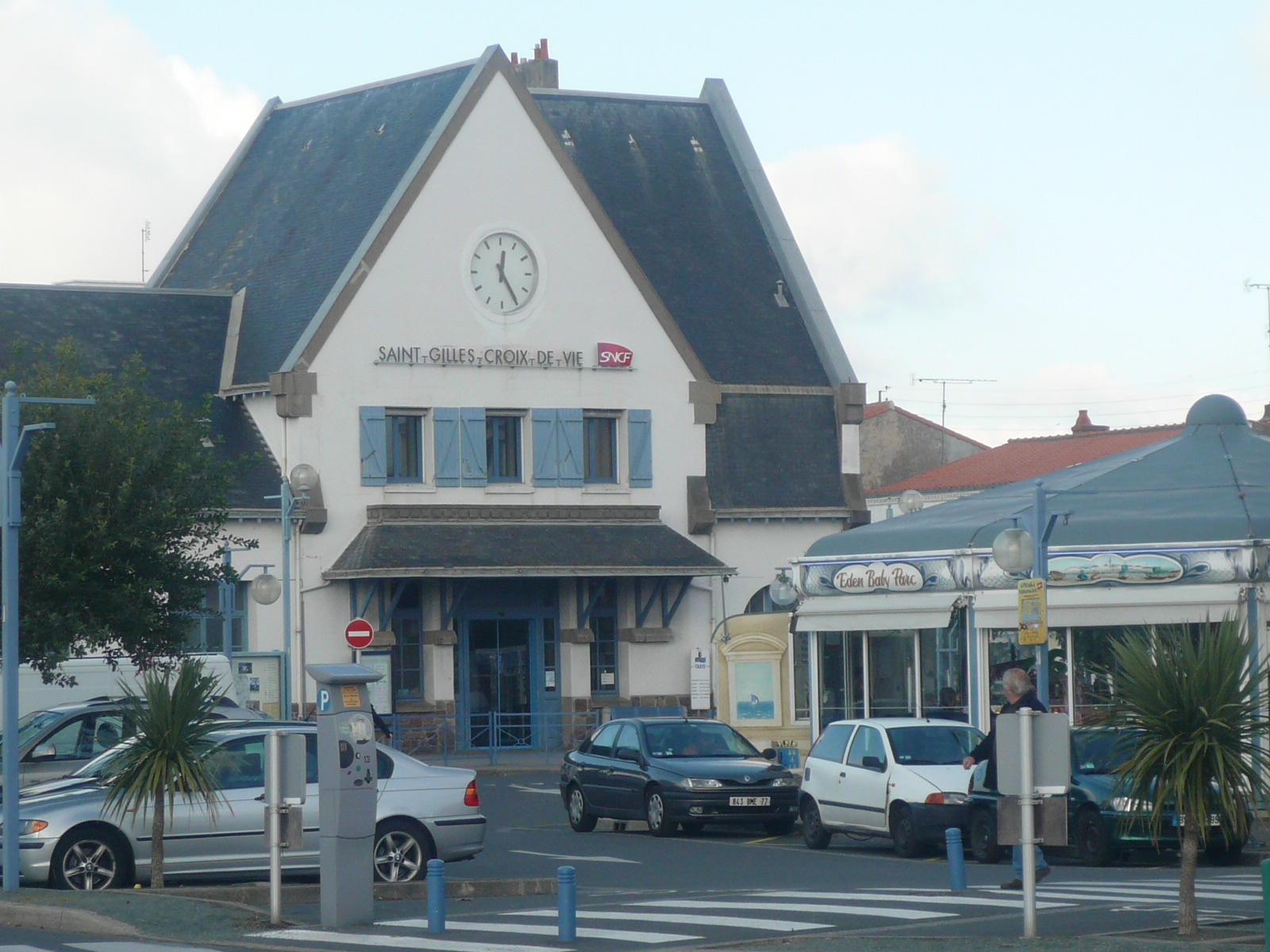 Saint-Gilles-Croix-de-Vie dans le département de la Vendée (France) : Façade du bâtiment voyageur de la gare, côté Croix-de-Vie, vue depuis la place de la gare en octobre 2008.